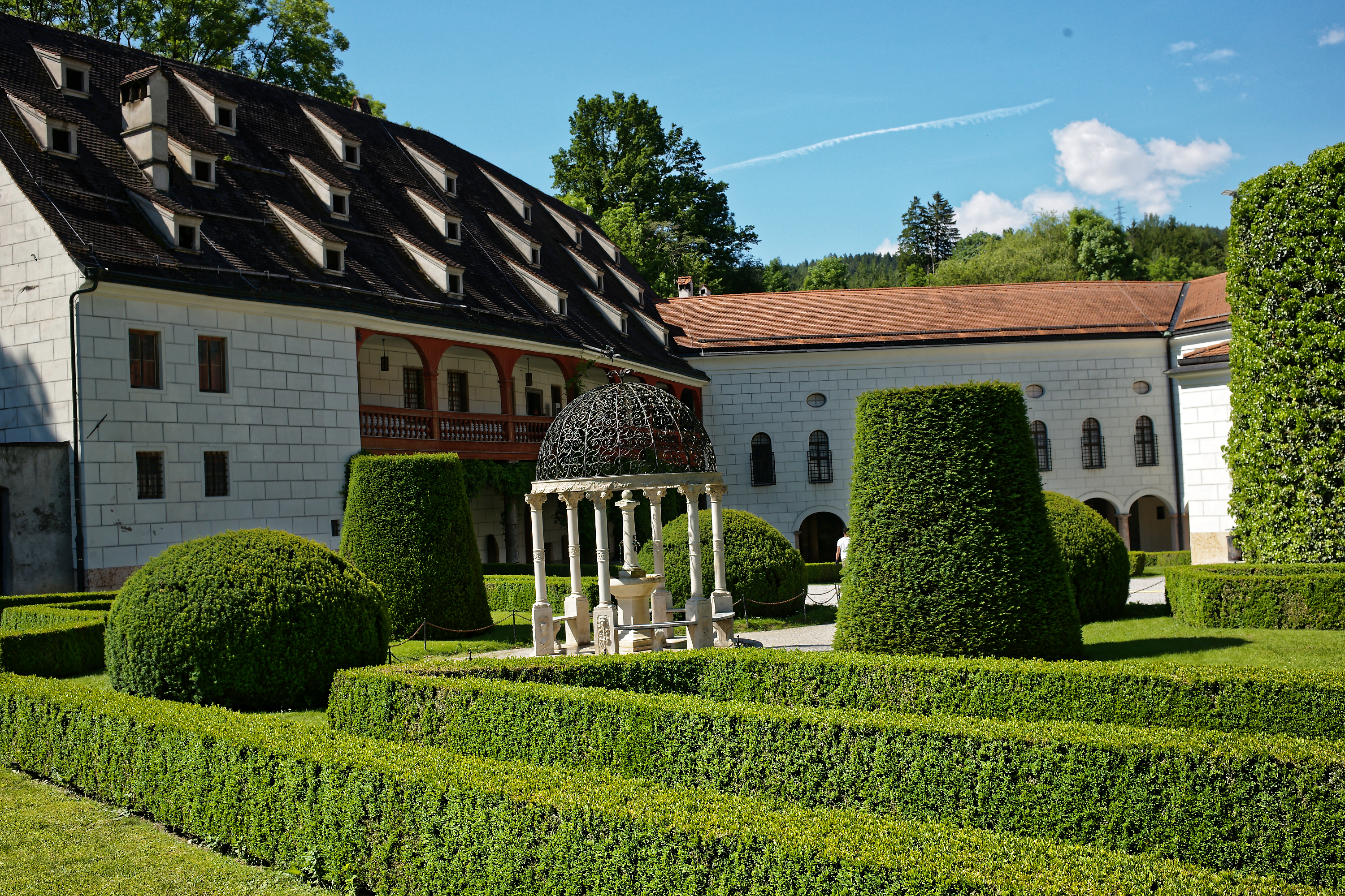 Formaler Gartenbereich mit immergrünen Hecken und Einzelelementen und Gazebo